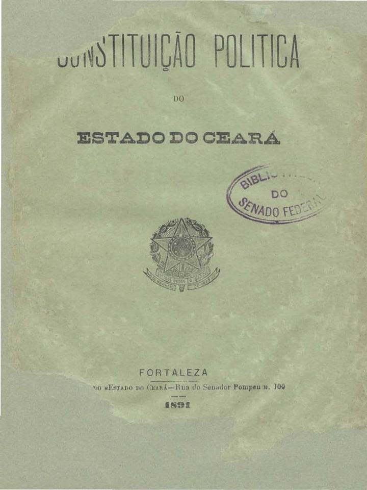 Contracapa da Constituição Política do Estado do Ceara de 16 de junho de 1891